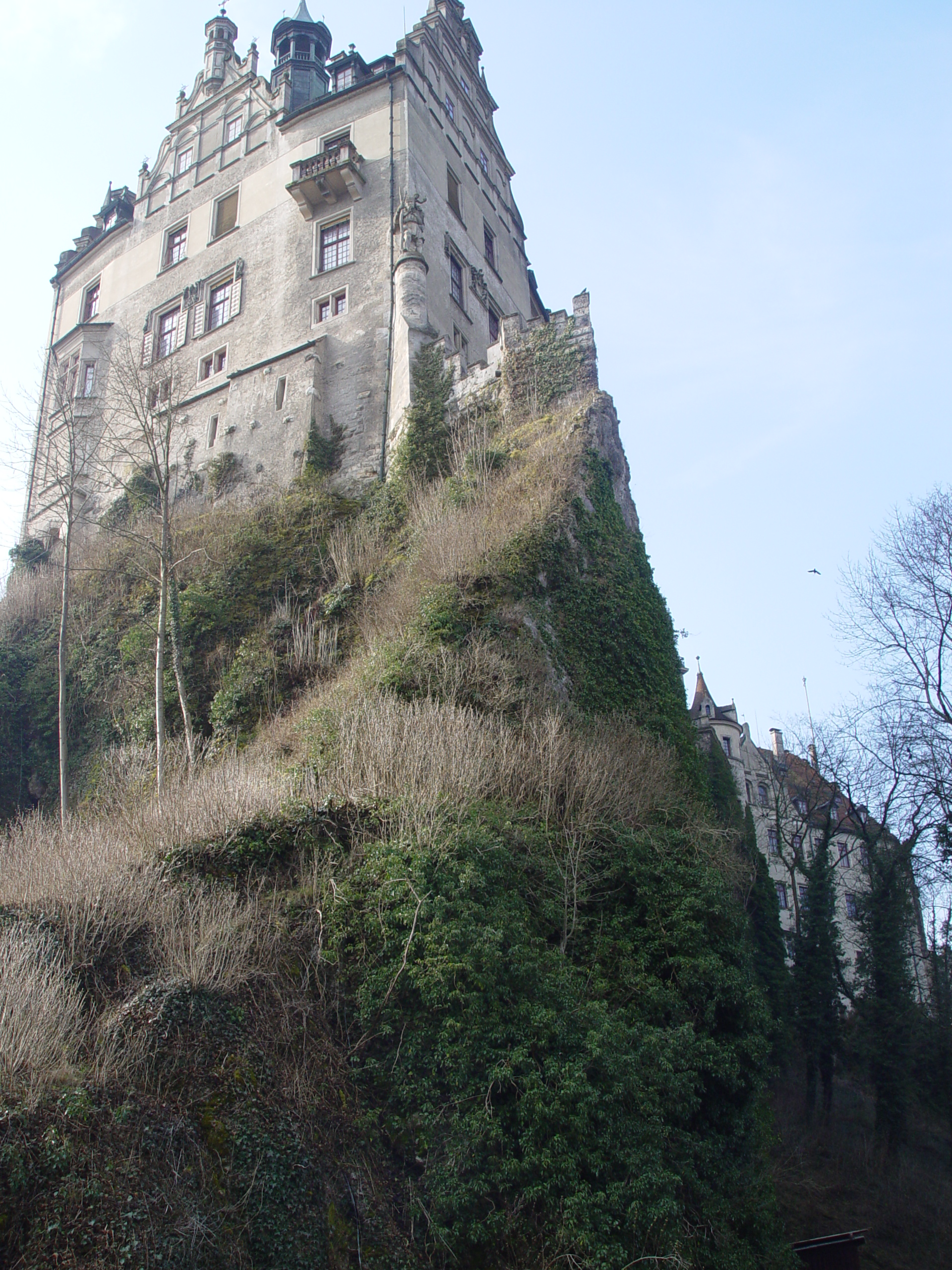 Schloss Sigmaringen vom Fuß des Schlossbergs aus gesehen